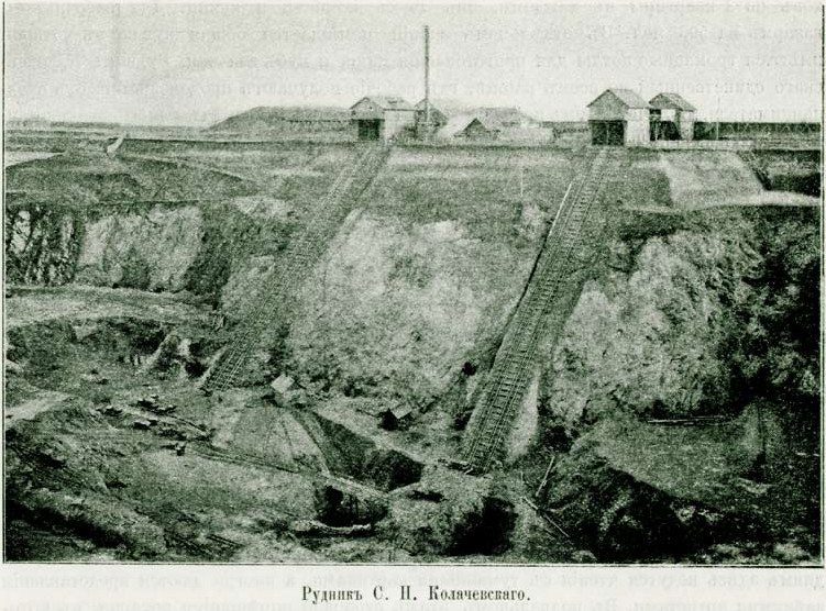 S. N. Kolachevsky's iron ore mine